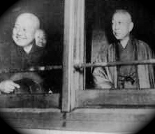 Prince Kinmochi Saionji and Senator Kojyuro Nakagawa